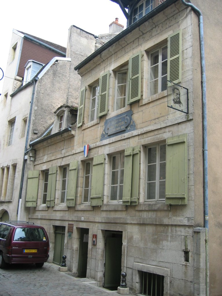 Maison de naissance de Louis Pasteur à Dole dans le Jura